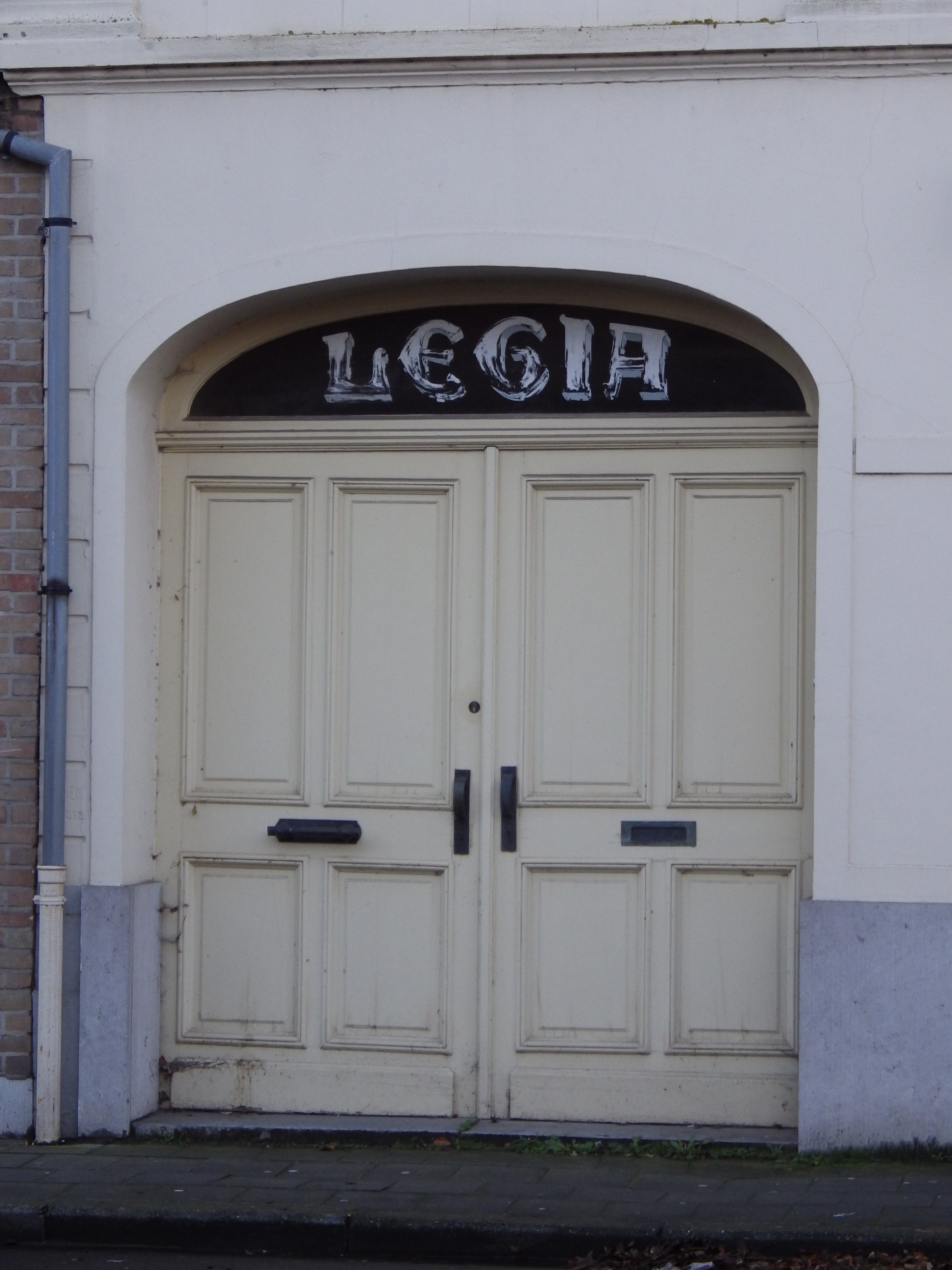 Toegangspoort waar nog altijd duidelijk zichtbaar is dat die naar de theaterzaal Legia leidt.